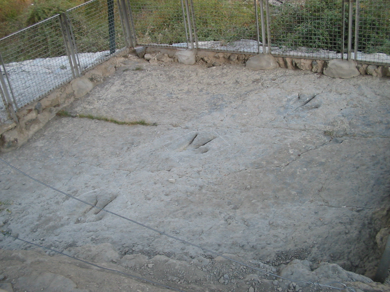 Dinosaur footprints at Yacimiento de Valdecevillo near Enciso, La Rioja, Spain.